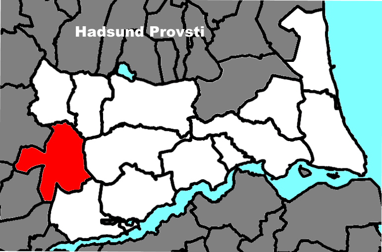 Sognets beliggenhed i Hadsund Provsti.